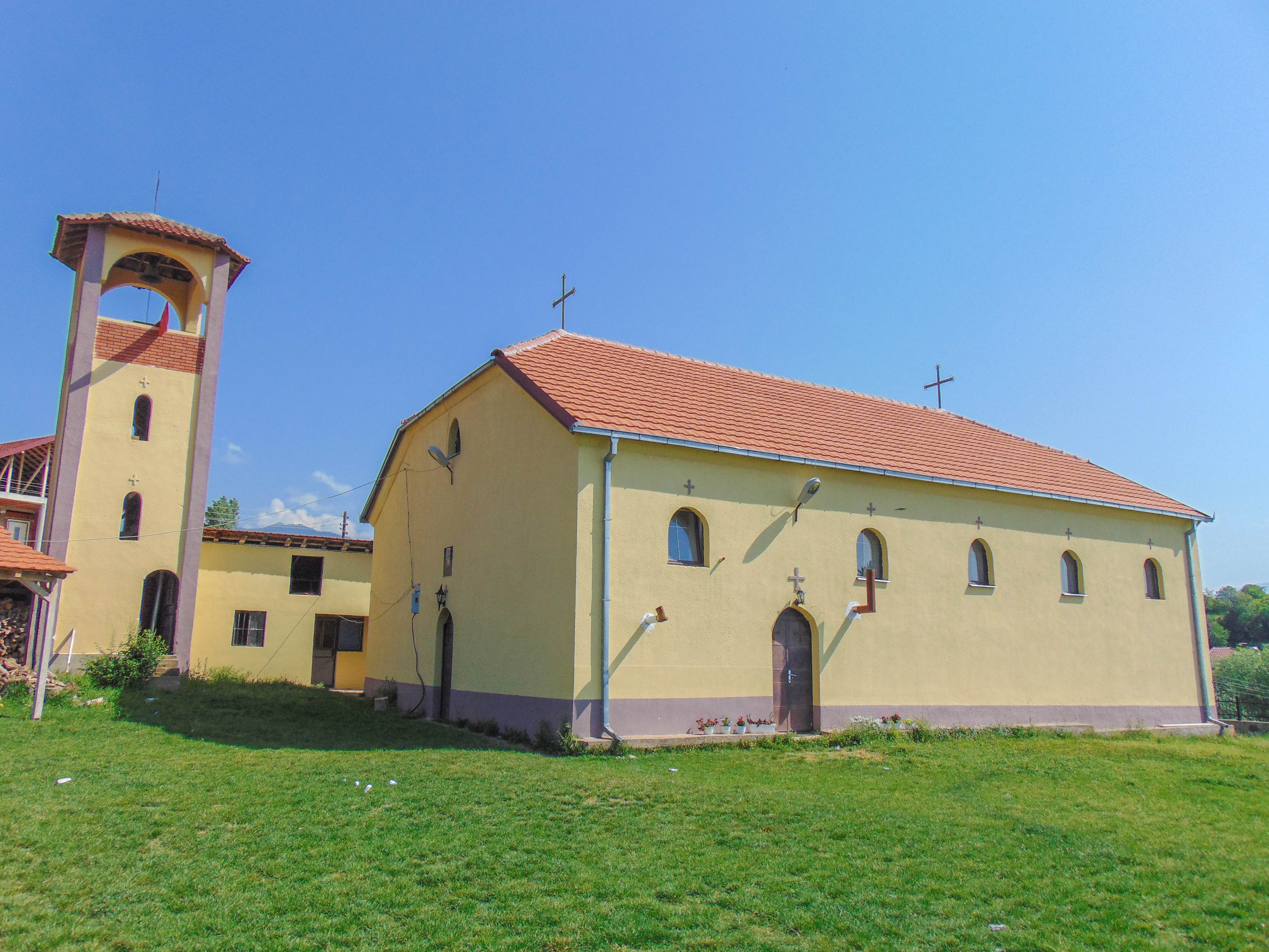 Црква „Успение на Пресвета Богородица“ - Злеово